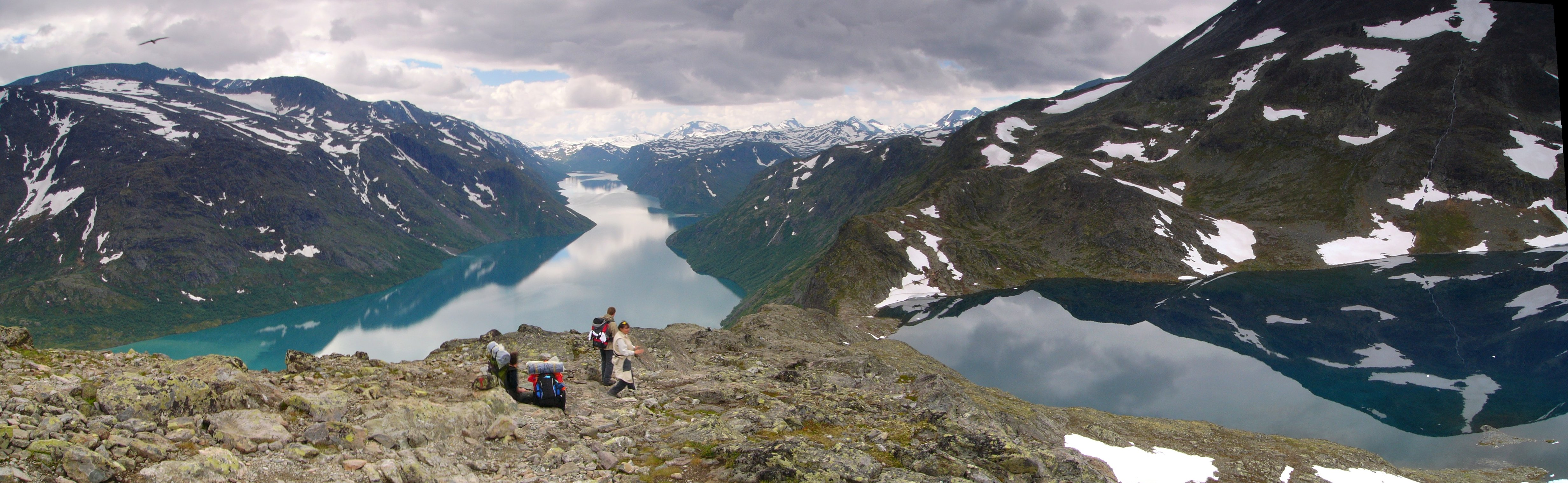 Bessegen ridge seen towards west Category:Oppland